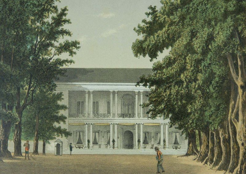 Litho. Litho naar een oorspronkelijke aquarel van J. Rappard.. Het huis van de resident in Bojong